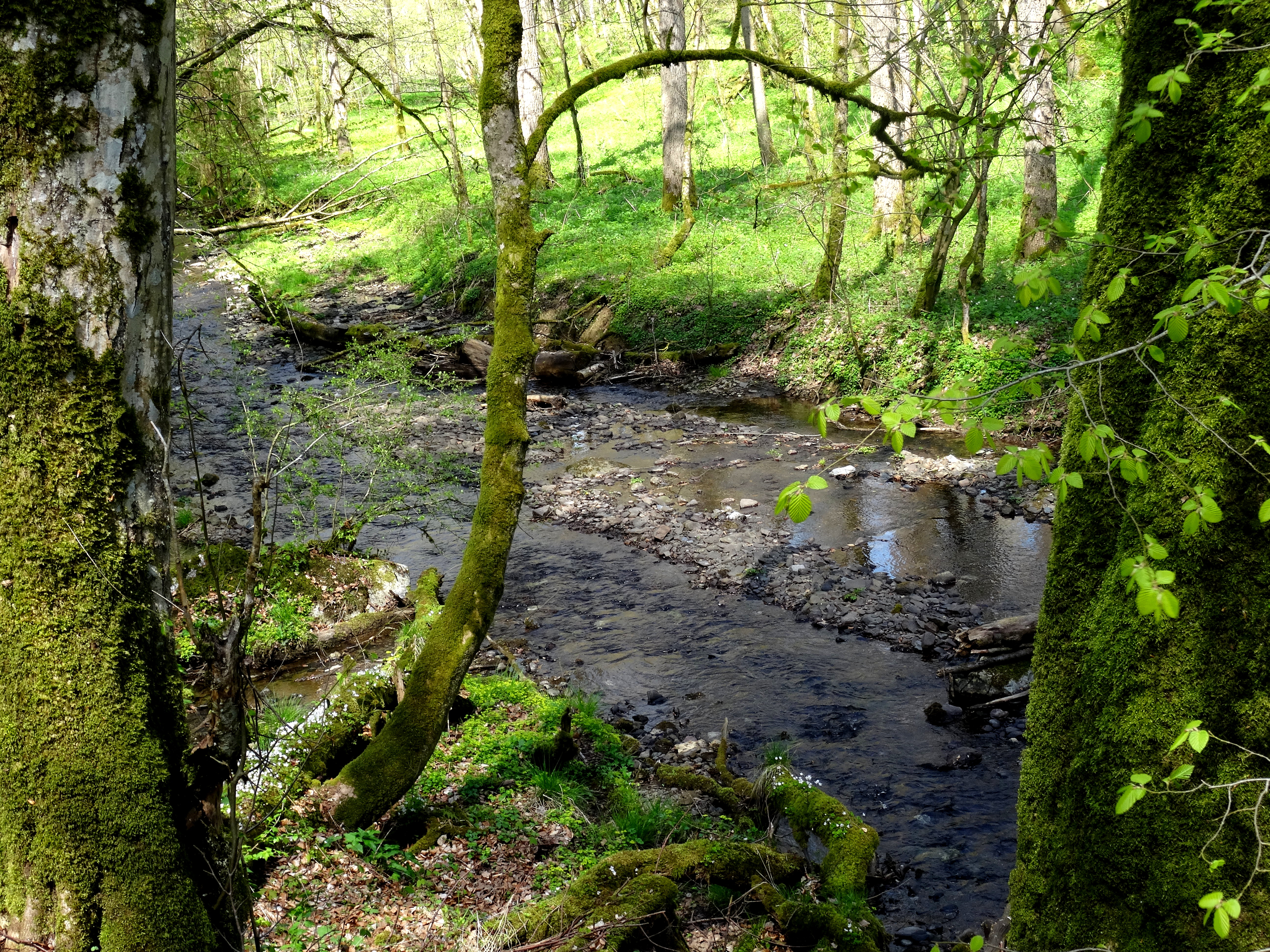 Die Lörmecke im Naturschutzgebiet „Lörmecketal“ (NSG SO-073), Gemeindegrenze zwischen Warstein und Rüthen; 266.0752